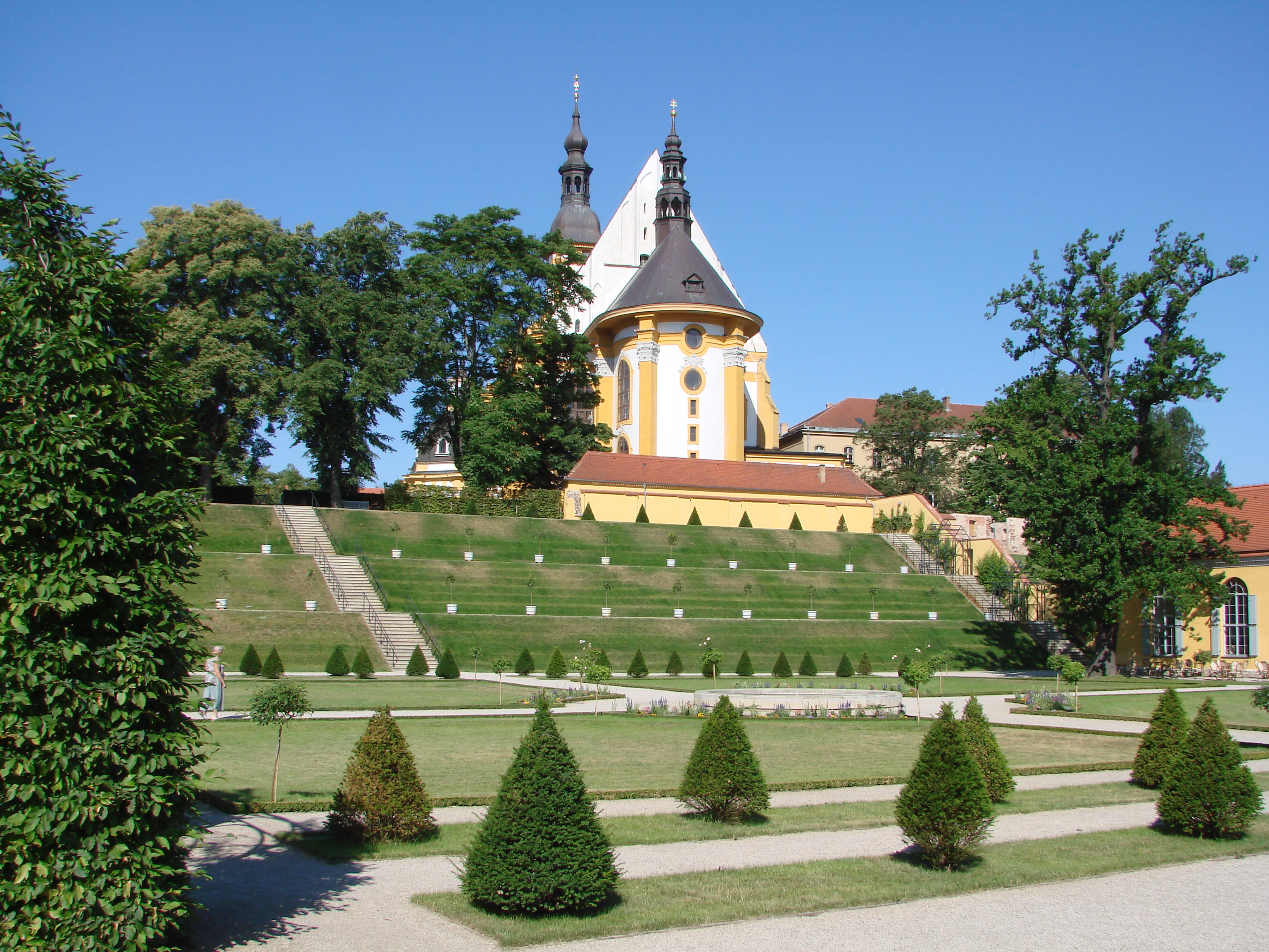 Stift Kloster Neuzelle Klosteranlage